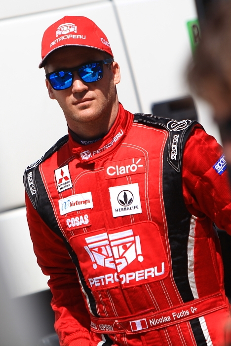 Nicolas Fuchs piloto de rally